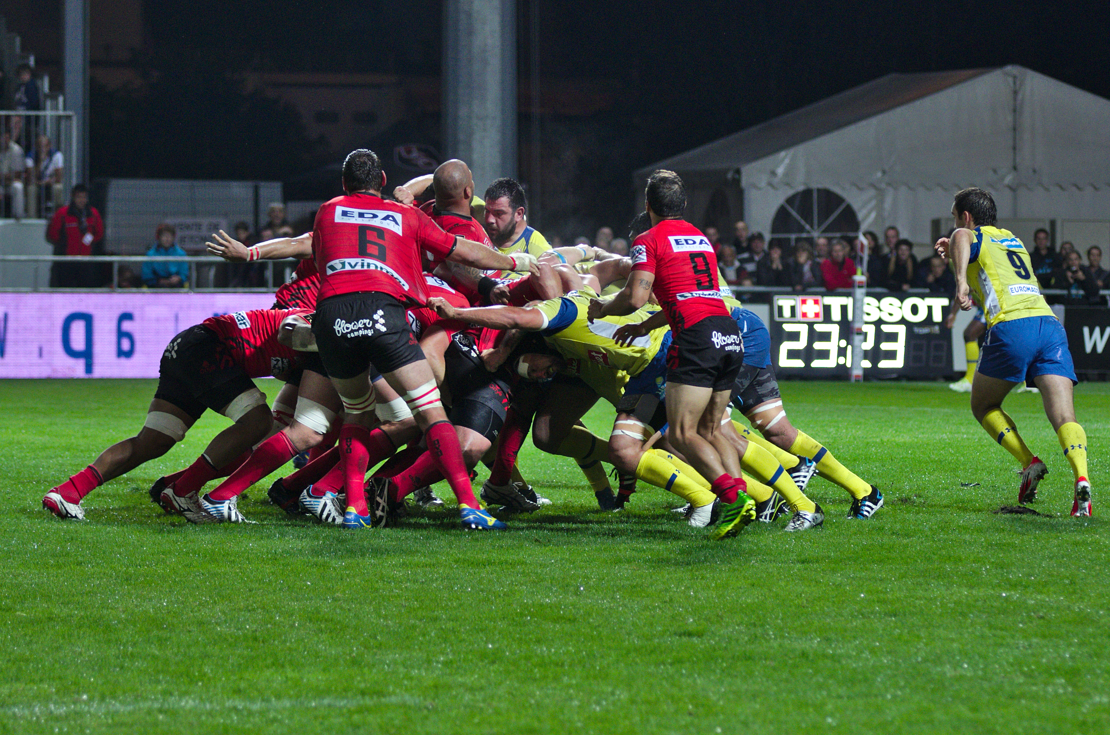 USO-ASM - 20140927 - Melée